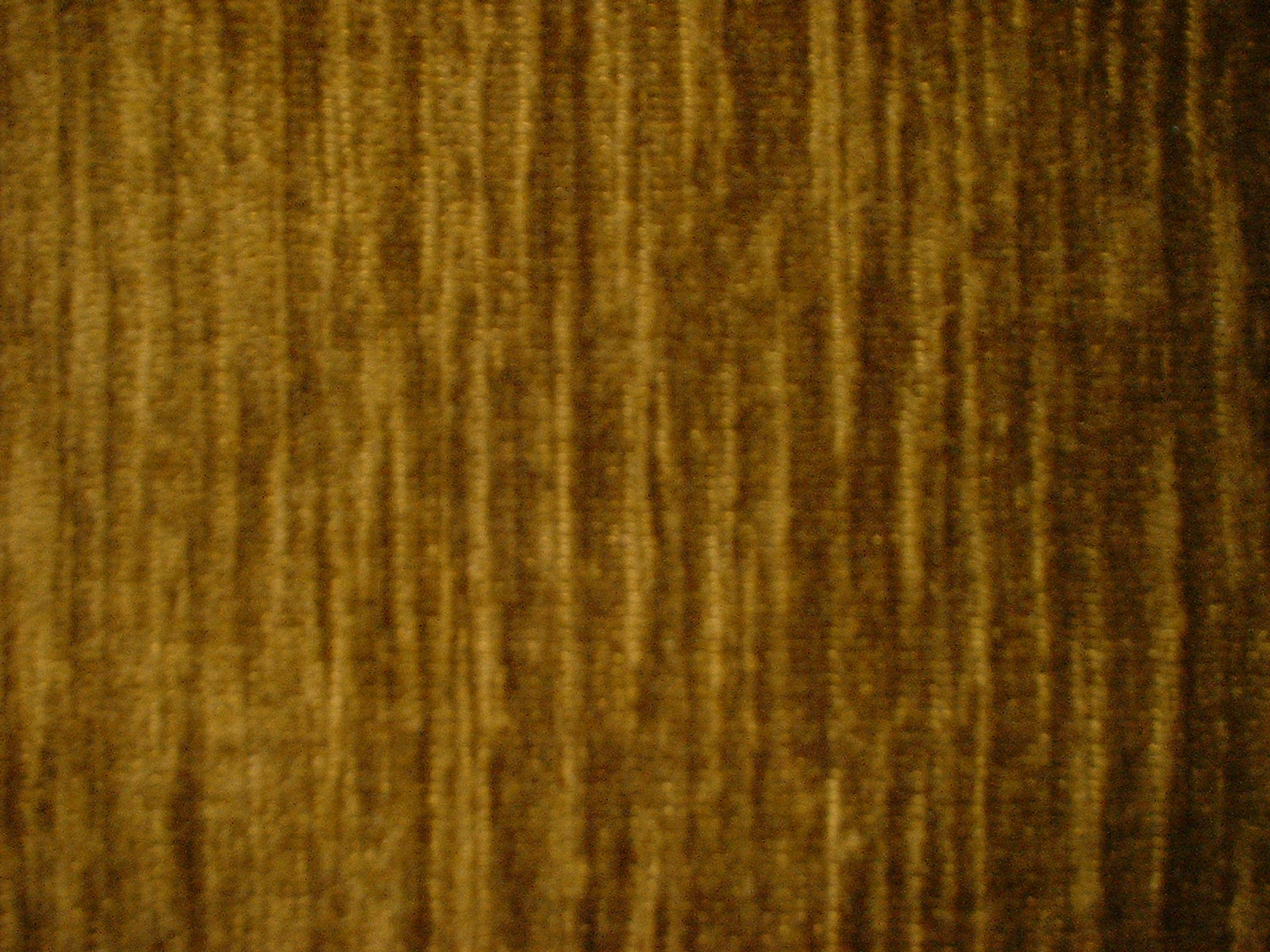 Vorhangstoff aus Chenillgarn (PAN)